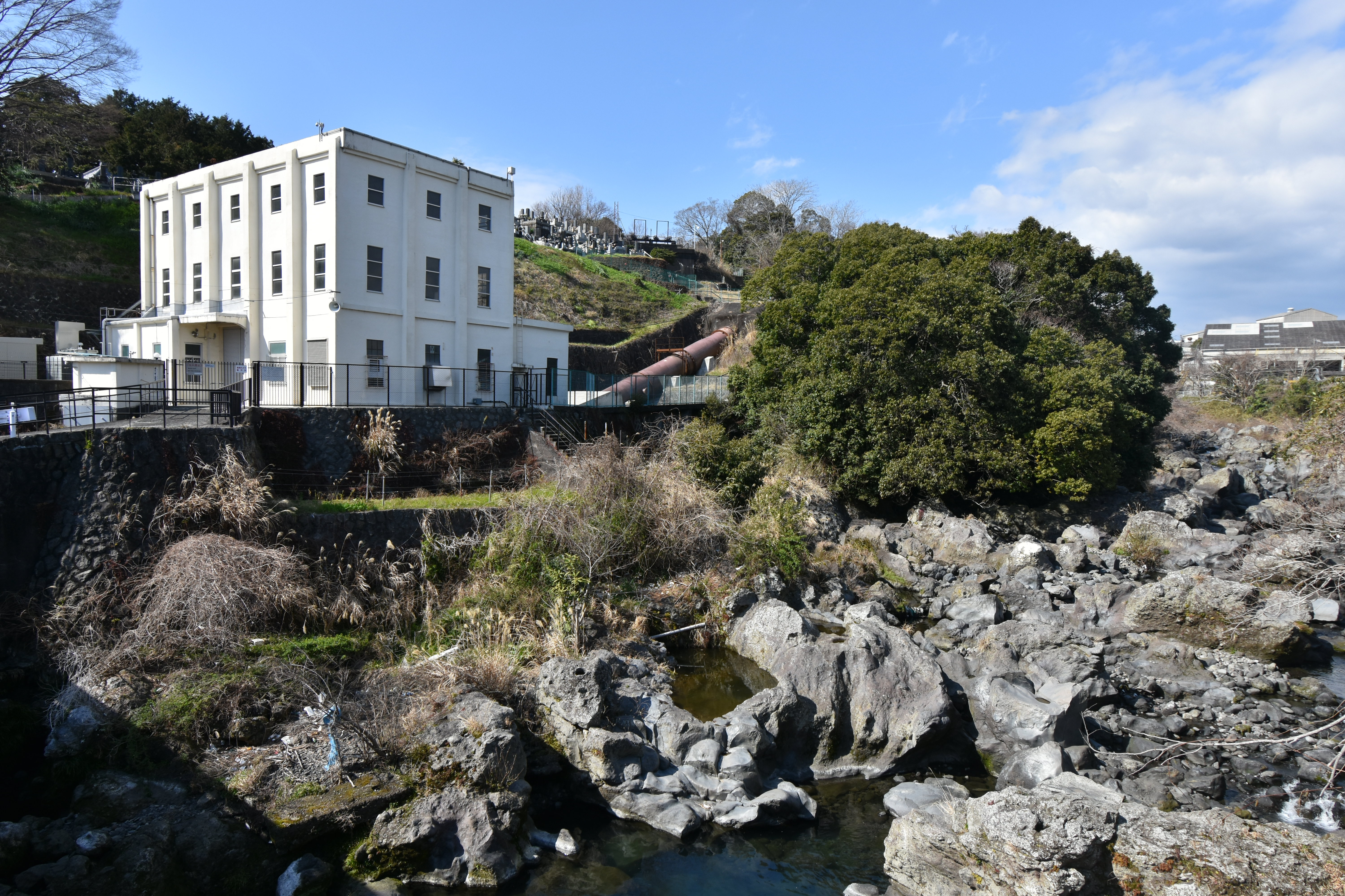 潤井川第三発電所と潤井川（静岡県富士宮市山本、2020/3/7）